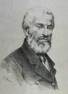 Ritratto di Paolo Gorini, conservato alla Biblioteca Laudense.